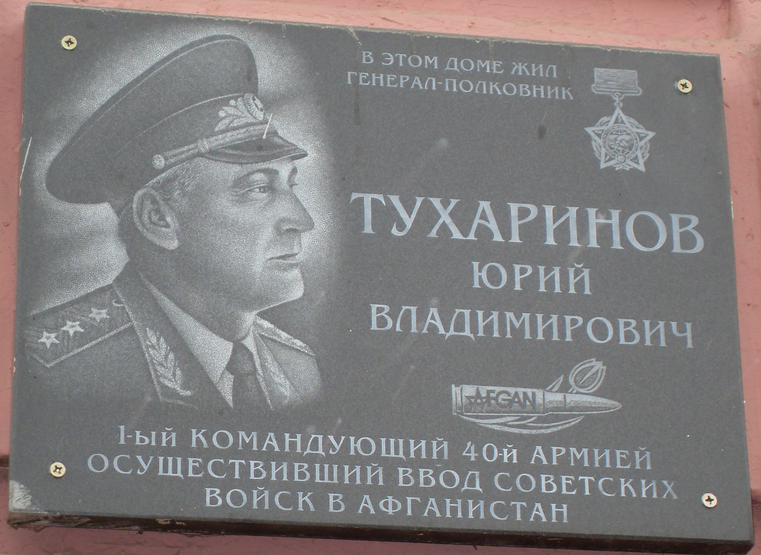 Мемориальная доска Тухаринову Юрию Владимировичу. Установлена на музее космонавтики в г.Киров